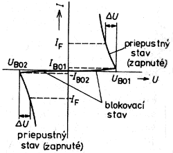 voltamperova charakteristika diaka